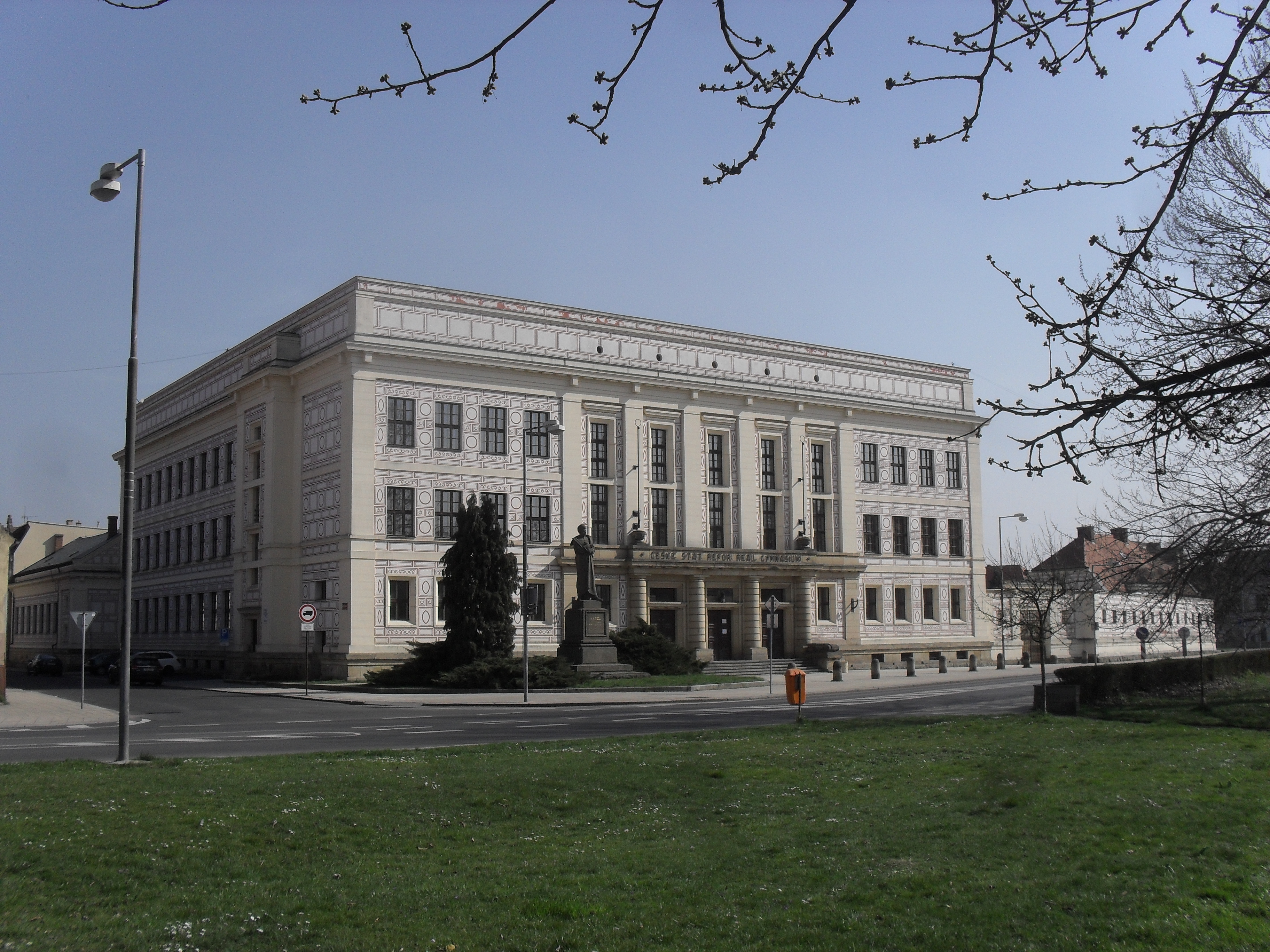 Duchcovské gymnázium